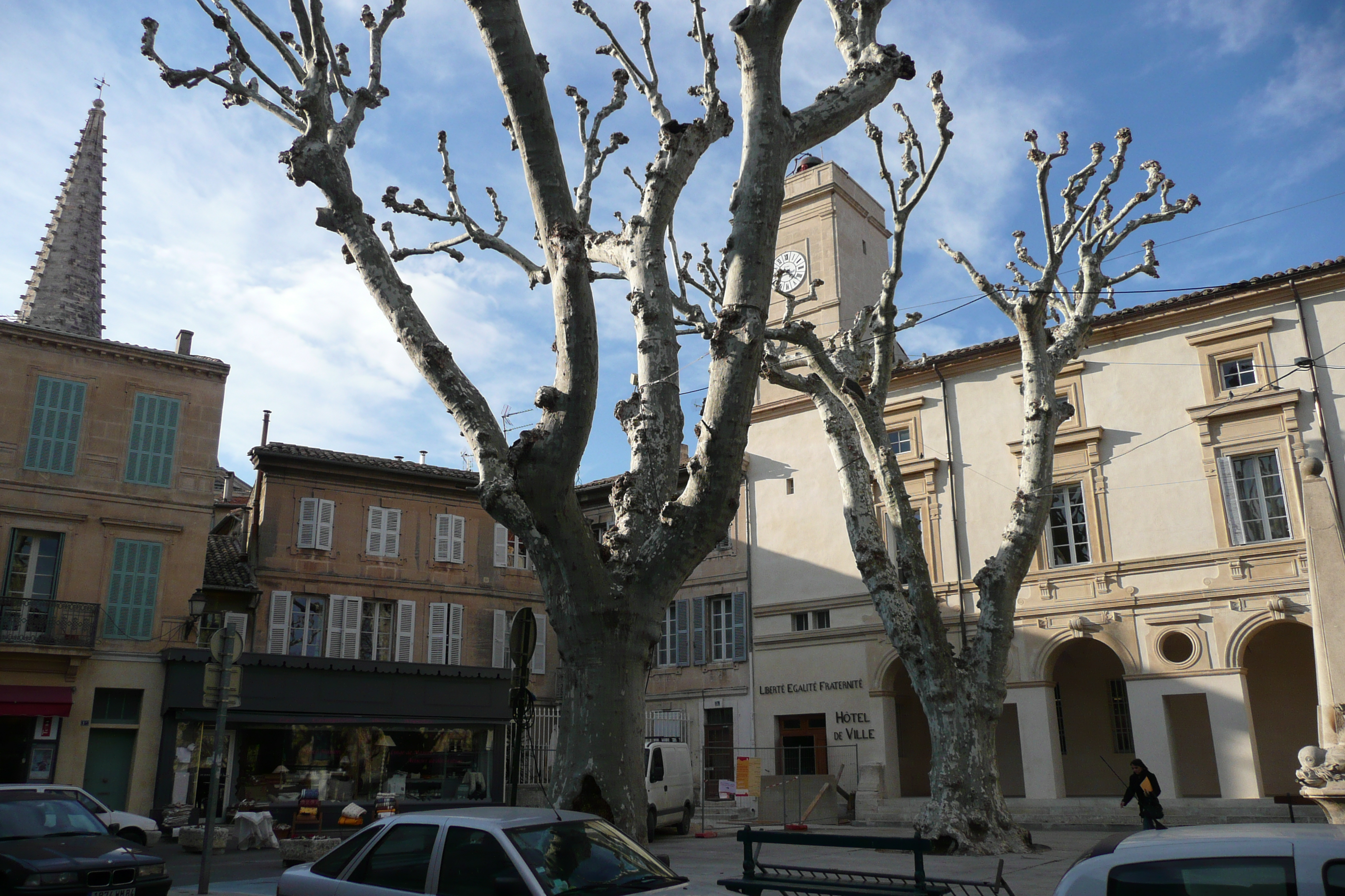 Place Jules-Pellissier (Saint-Rémy-de-Provence).